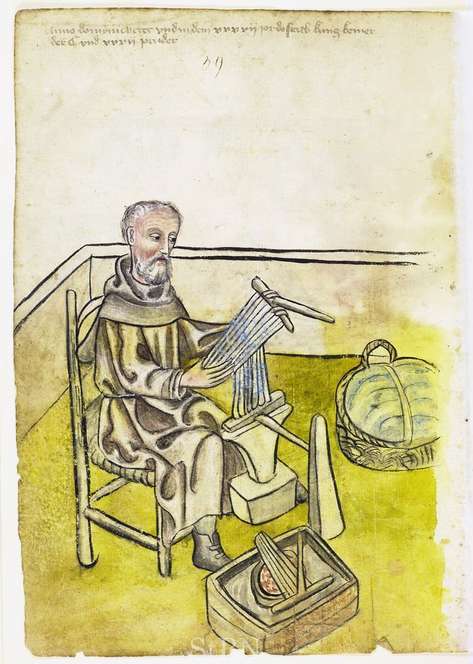 Kuncz (Kunz) Kemer (Kämmer; Kemmer) , Kemer (Wollkämmer) Transkription und weitere Informationen